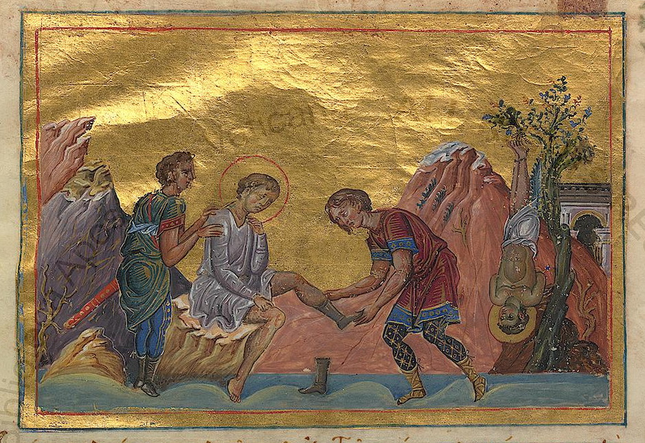 Мученик Созонт Константинополь. 985 г. Миниатюра Минология Василия II. Ватиканская библиотека. Рим.